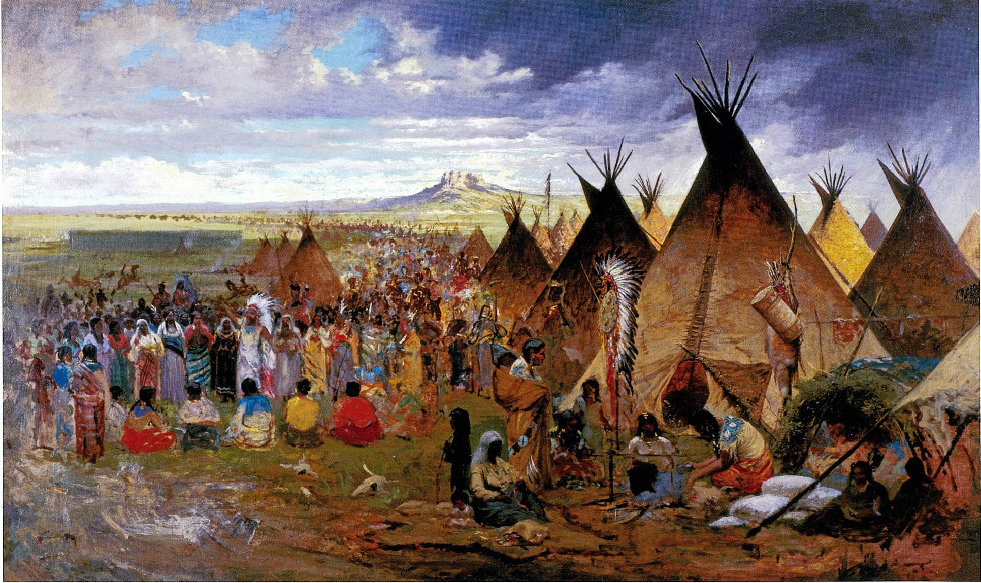 Sioux Encampment